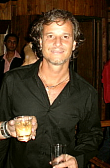 Marcelo Novais na festa de lançamento da novela "América" (2005)